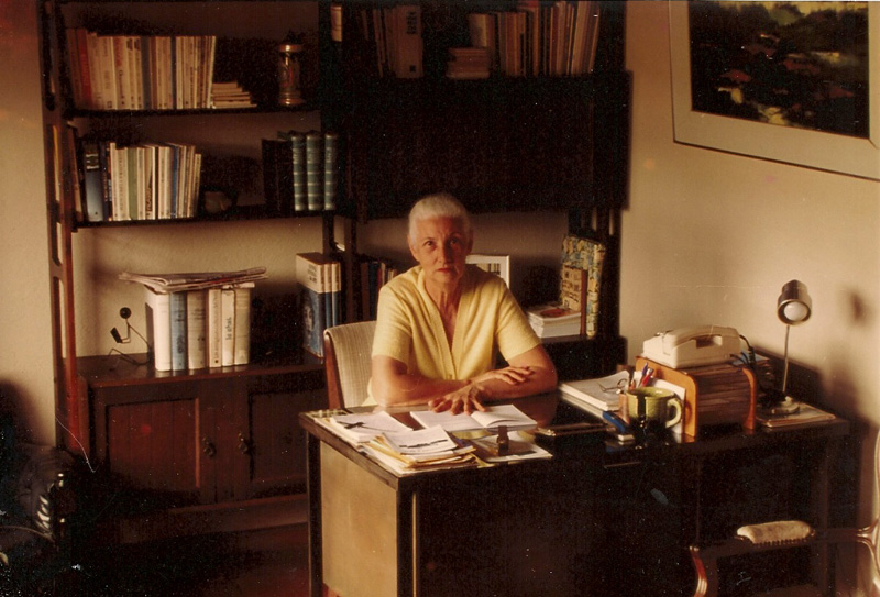 maria jose giglio, casa do escritor, cde, gatos, poeta, poesia, jornal, cds, bazar, literatura, mjg